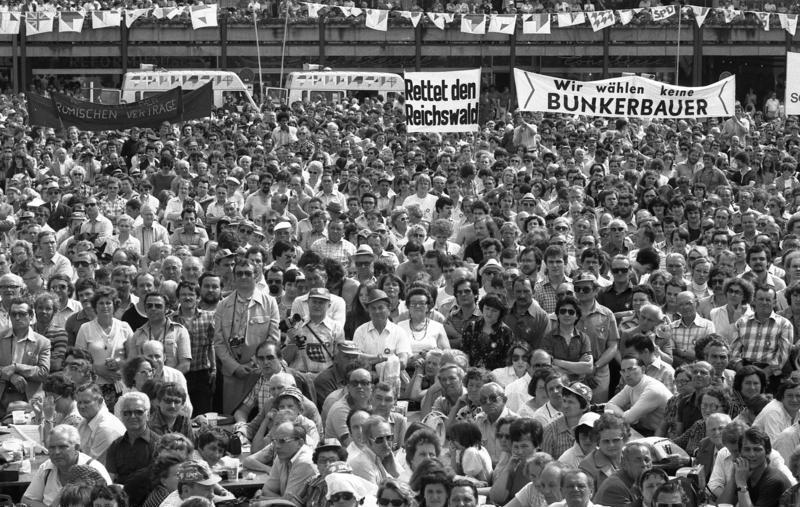 Eröffnung des Europa-Wahlkampfs der SPD mit Bundeskanzler Helmut Schmidt und Willy Brandt in Nürnberg.